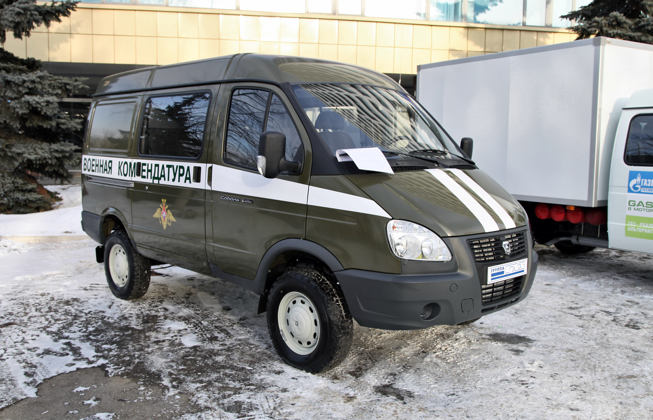 Автомобиль военной инспекции на базе ГАЗ-27527 Соболь (Military inspection vehicle on GAZ-27527 base)